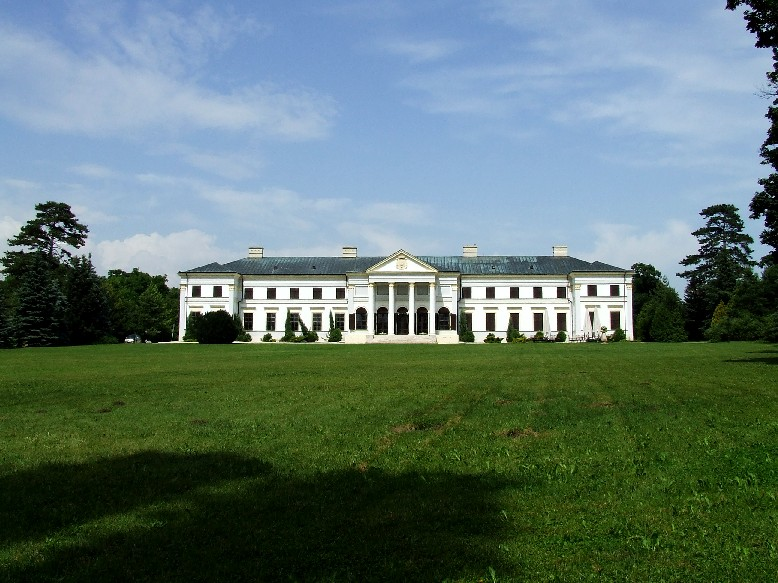 Zichy-Hadik kastély, Seregélyes. Saját kép. Egresi János 2006. szeptember 23., 12:52 (CEST)